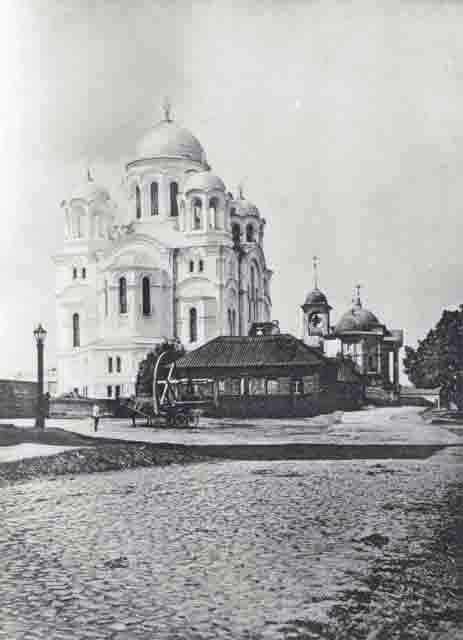 Анастасіївська церква (східний фасад)